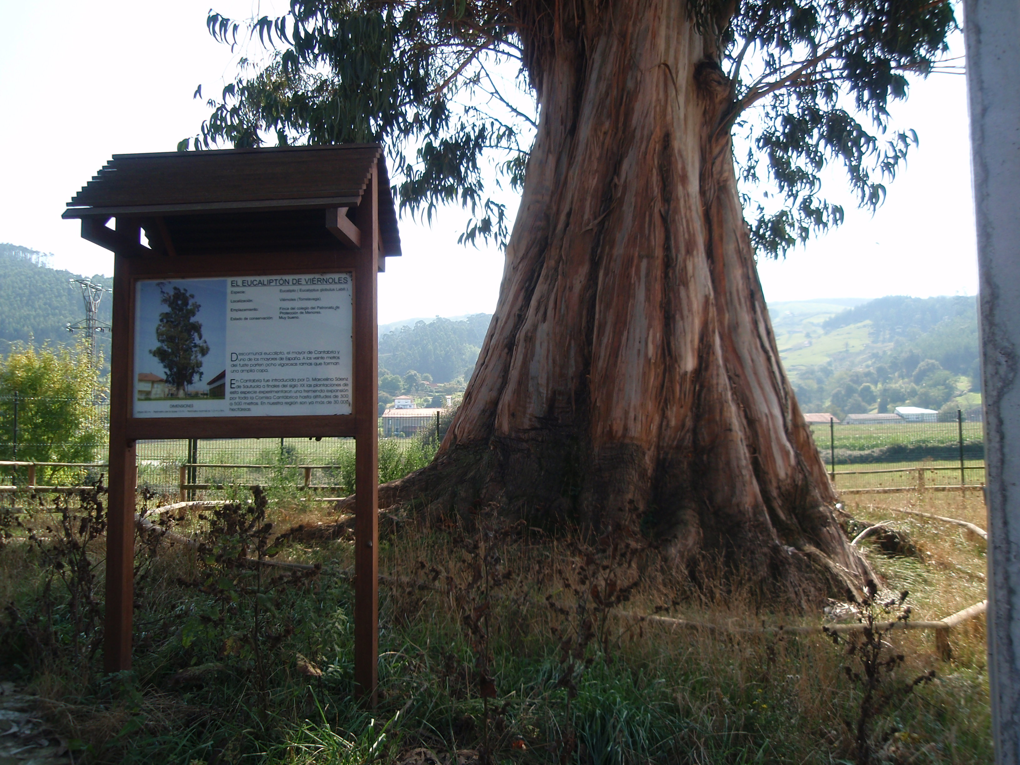 Número 7, Arboles Singulares de Cantabria.